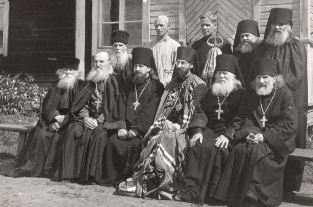 Piispa Mihail vierailulla Konevitsan luostarissa Keiteleellä kesällä 1954. Kuvassa piispan vasemmalla puolella (3. vas.) igumeni Pietari (Jouhki)